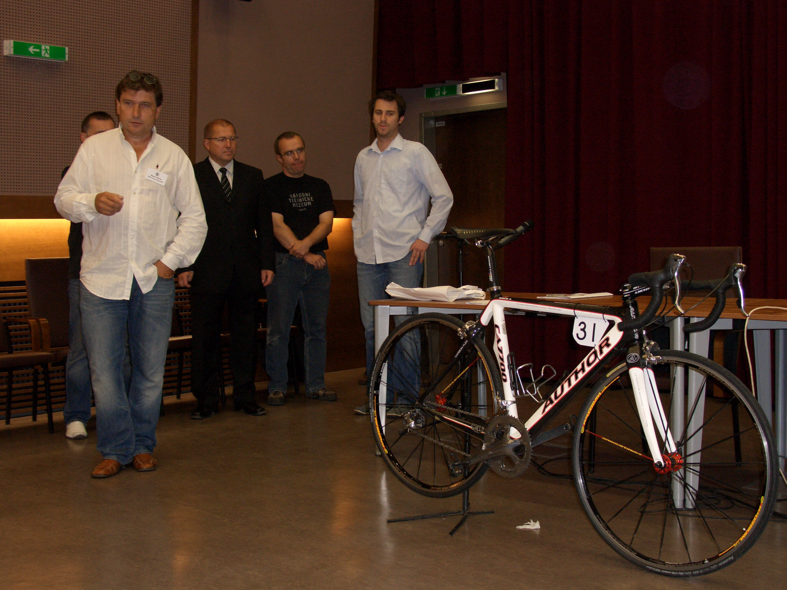 Robert Štěrba (l.), ehem. tschechischer Radrennfahrer, Fahrradhersteller und - sammler